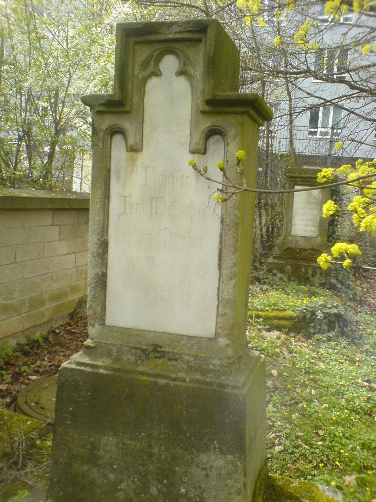 Grab des Orientalisten Heinrich Ferdinand Wüstenfeld, restauriert 2007/2008